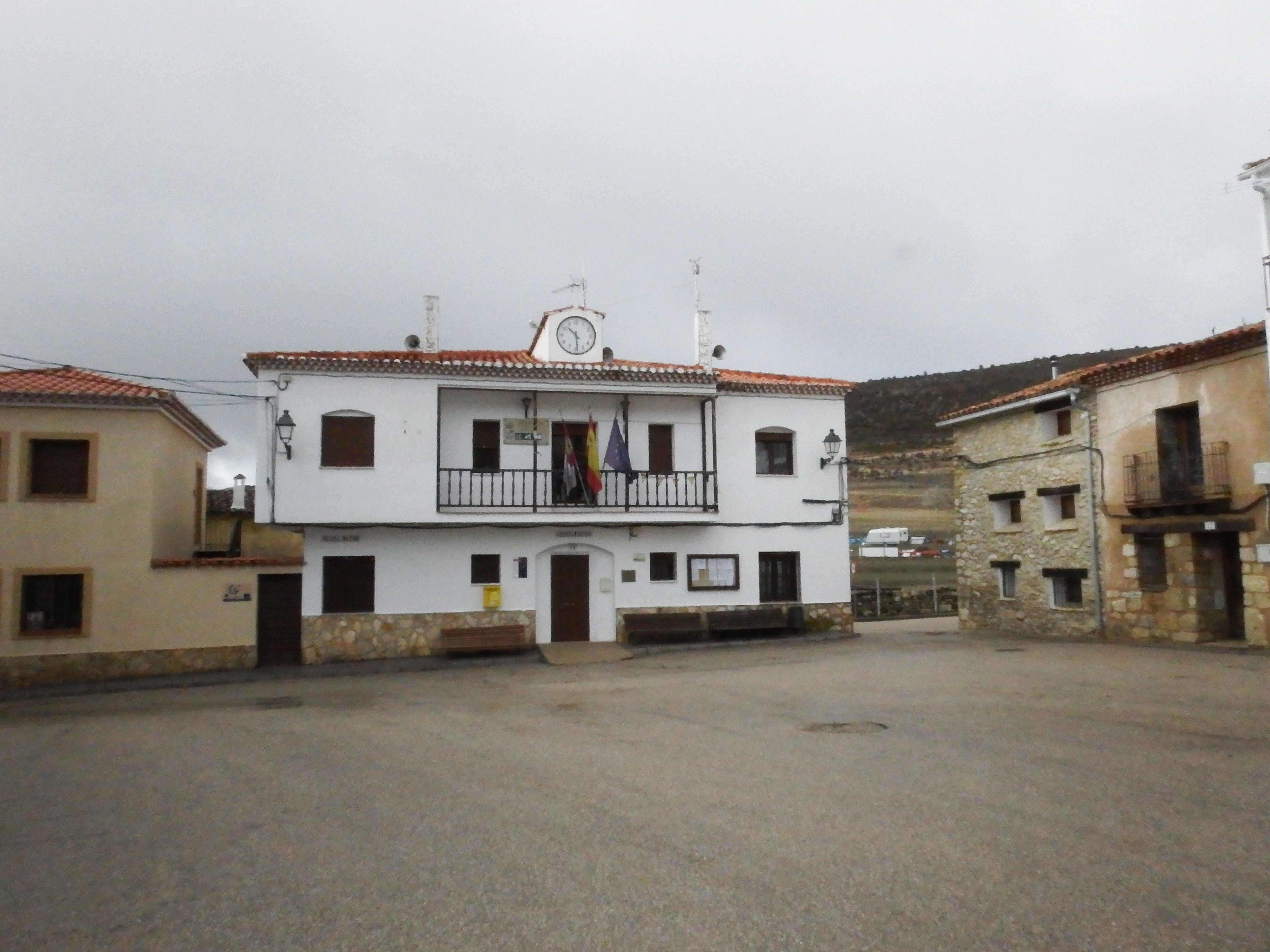 Ayuntamiento de Zafrilla